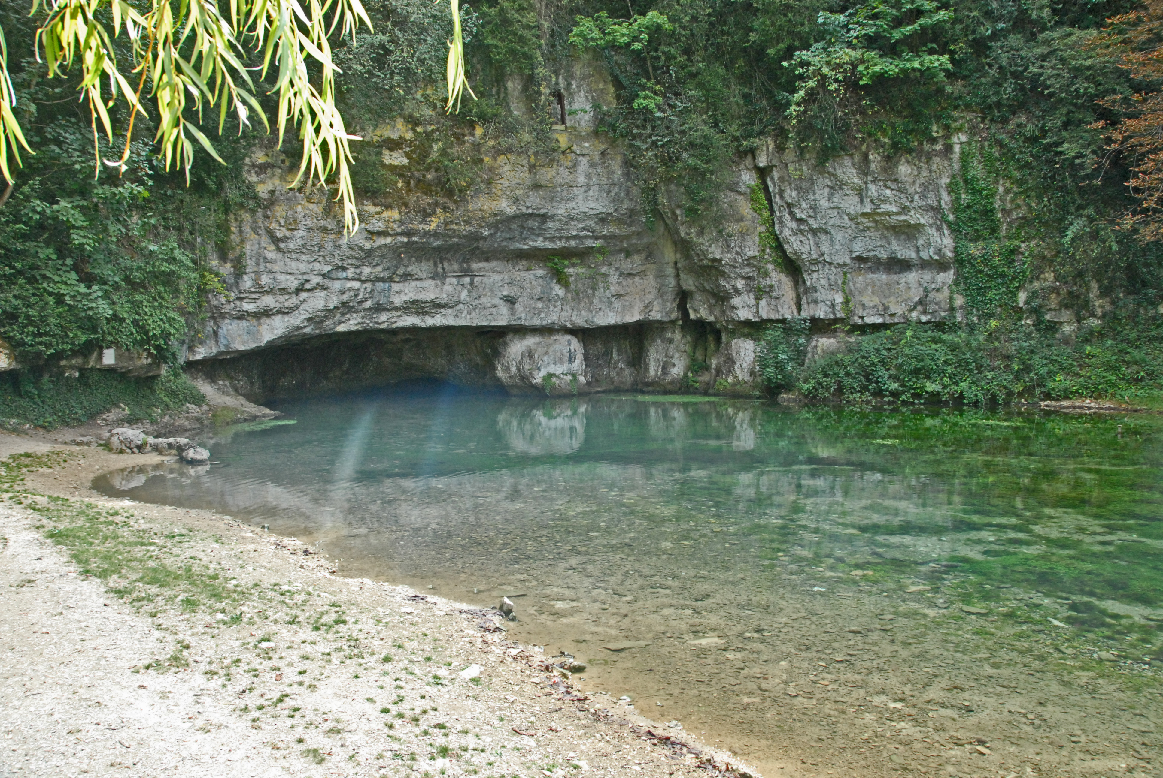 Karstquelle des Flusses "Douix", Châtillon-sur-Seine, Frankreich.